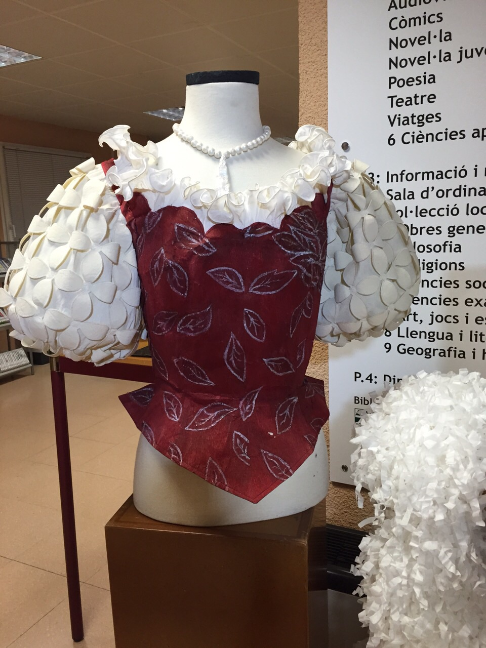 Aquesta fotografia mostra una brusa feta completament de paper per al concurs nacional de vestits de paper. La foto està feta a la Biblioteca Jaume Vila de Mollerussa.